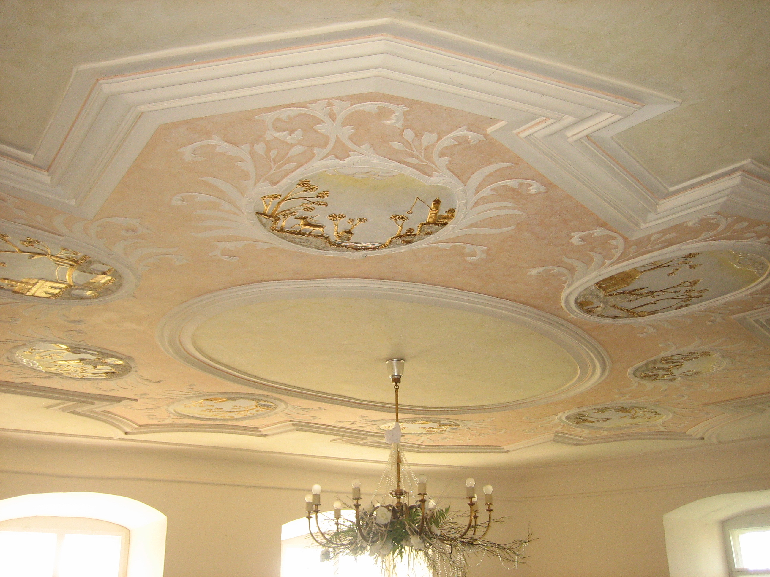 Hohes Schloss, in Bad Grönenbach, Landkreis Unterallgäu, Bayern. Innenansicht. Hohes Schloss zu Bad Grönenbach, ca. 17. Jh.